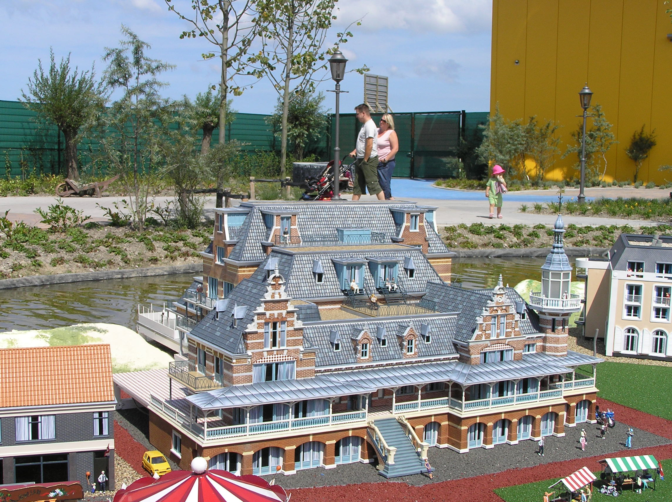 Miniatuur van Badpaviljoen te Domburg op Mini Mundi.